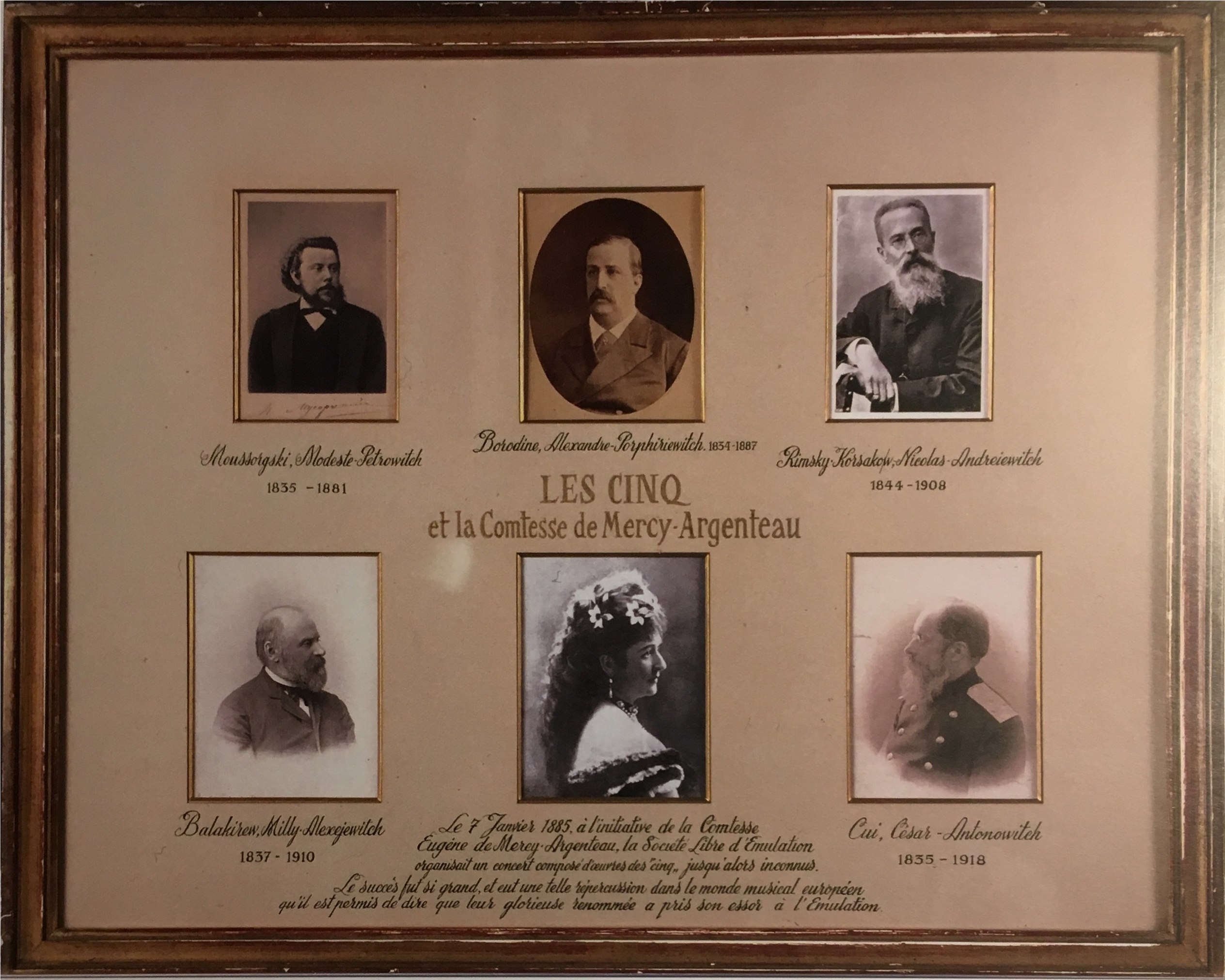 Le 7 janvier 1885, à l'initiative de la Comtesse Eugène de Mercy-Argenteau, la Société Libre d'Emulation organisait un concert composé d'oeuvres des "cinq" jusqu'alors inconnus. Le succès fut si grand, et eut une telle répercussion dans le monde musical européen qu'il est permis de dire que leur glorieuse renommée a pris son essor à l'Emulation. Liège, propriété de la Société Libre d'Emulation